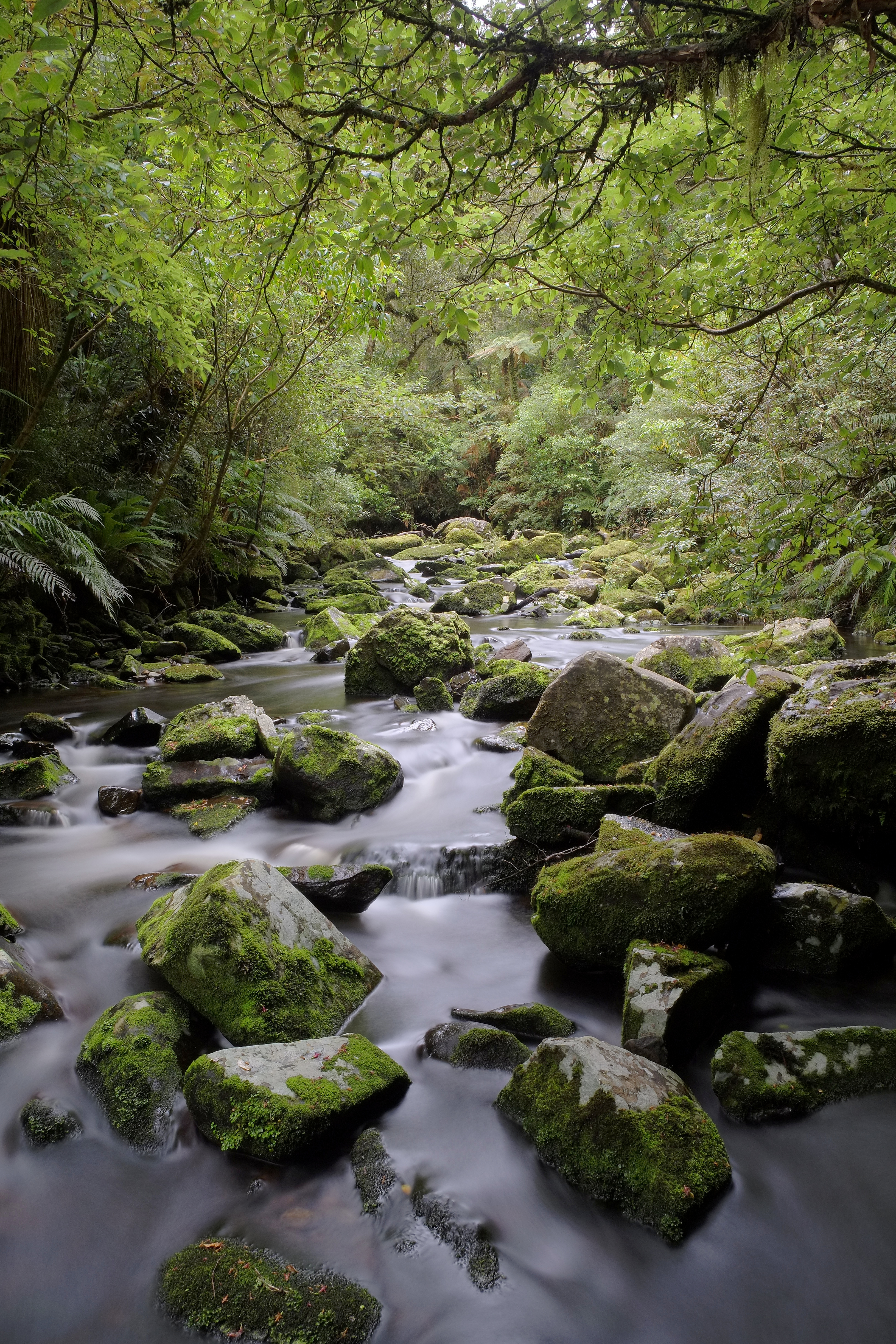 Tautuku River